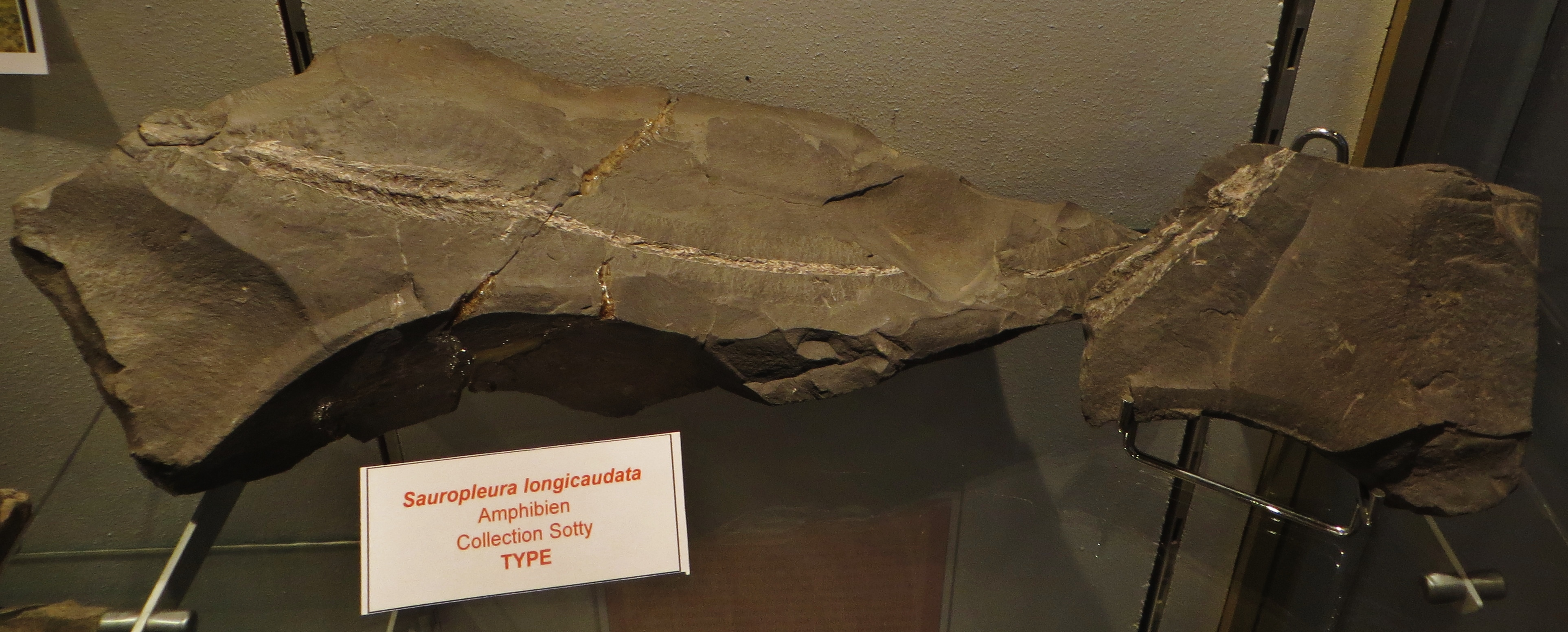 Fossil - Took the picture at Museum of Natural History, Autun